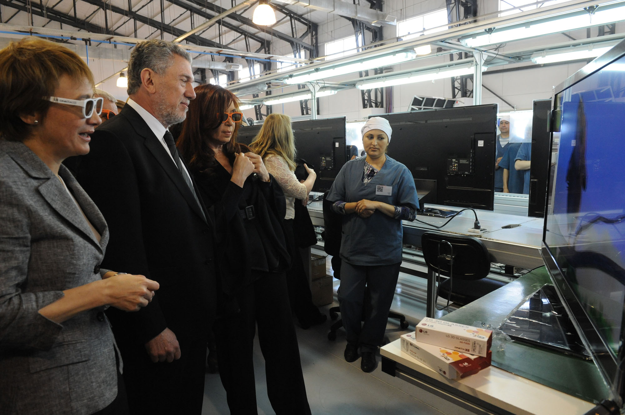 La presidenta Cristina Fernández observa una pantalla con anteojos 3D, durante su recorrida por la nueva planta de Newsan, en Ushuaia. La acompañan el titular de la compañía, Rubén Cherñajovsky, la gobernadora de Tierra del Fuego, Fabiana Ríos, y una trabajadora de la fábrica.